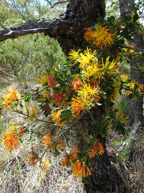 Desmaria mutabilis, Rucamanque, Flora conspicua Chilena